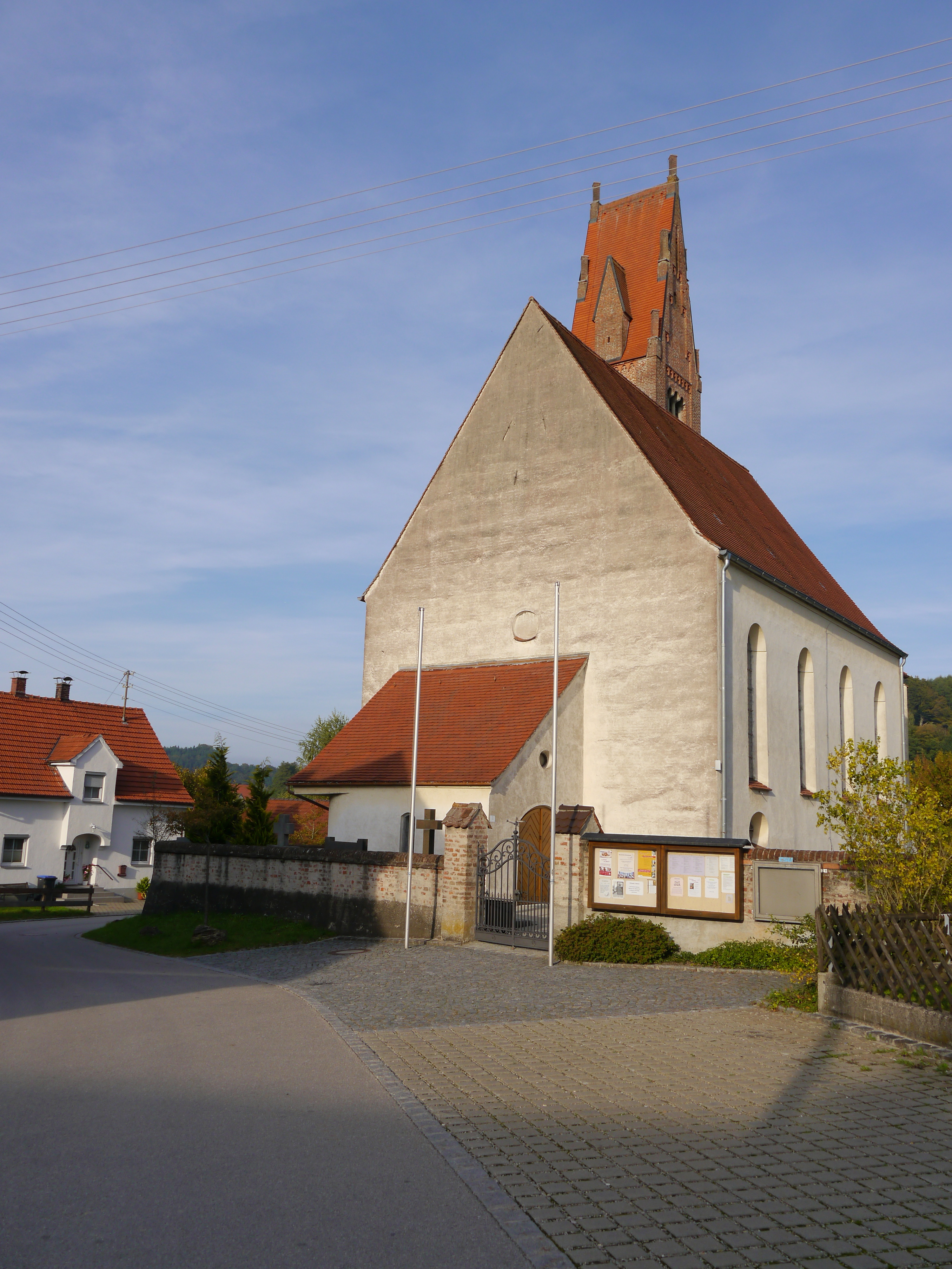 Katholische Pfarrkirche St. AlbanThis is a photograph of an architectural monument.